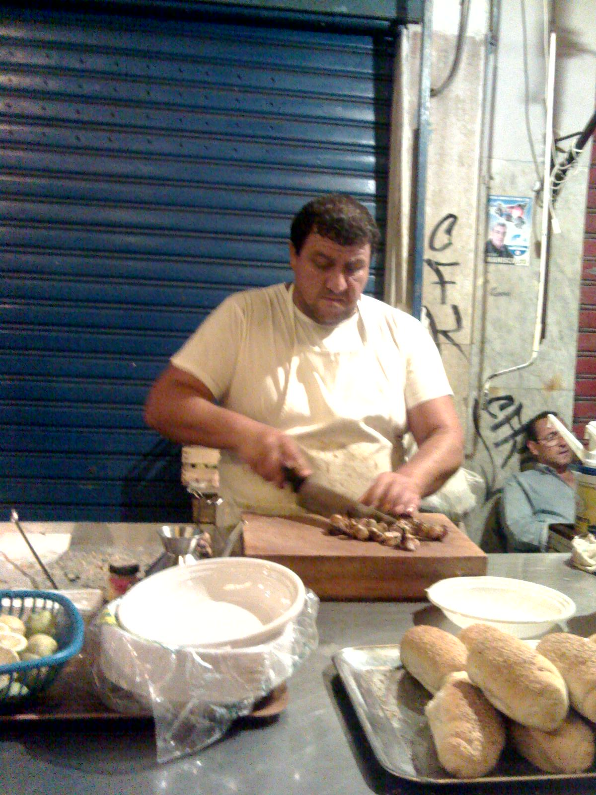 a tipical sicilian "stigghiolaro", in Palermo